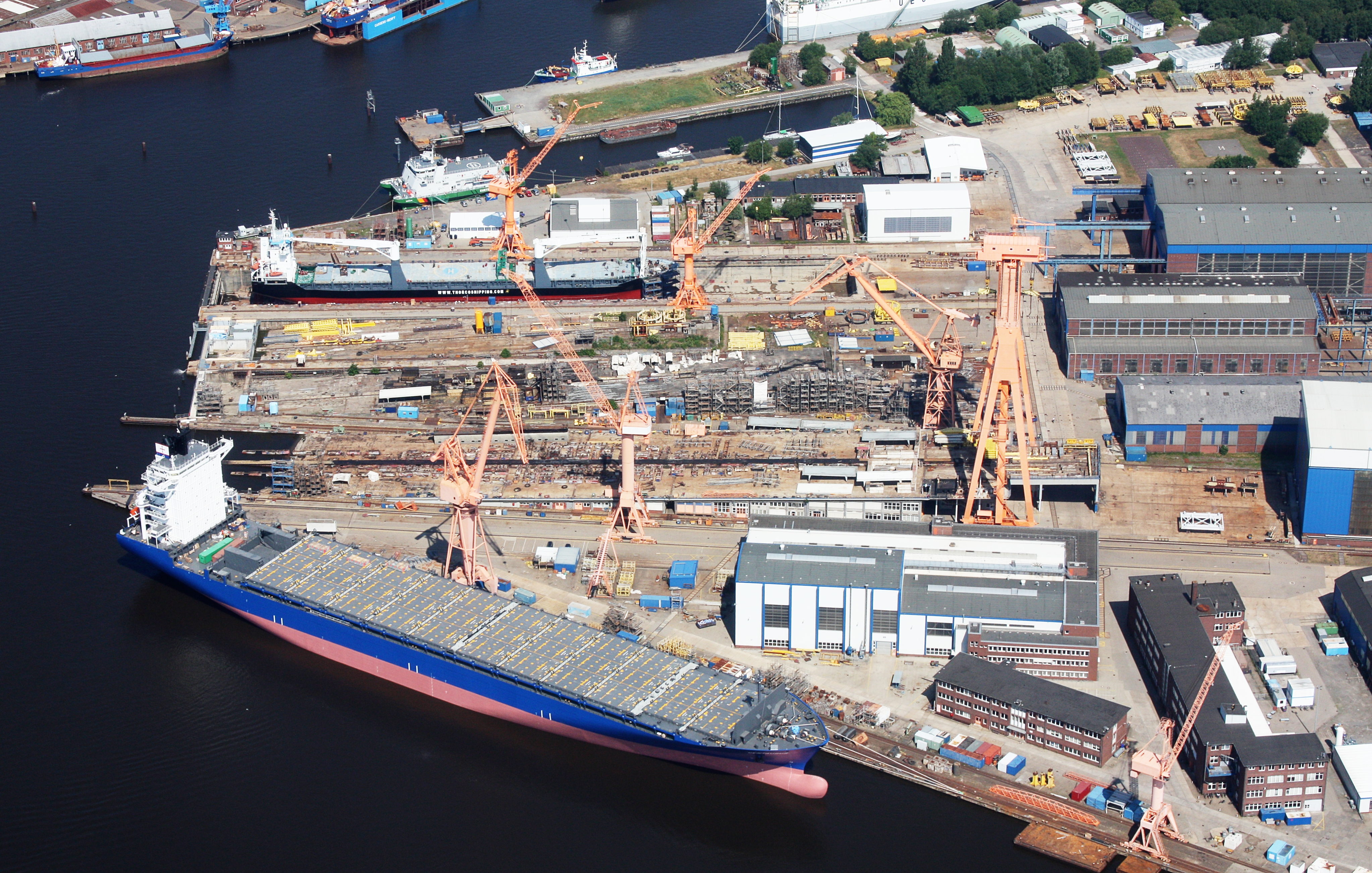 Flug über Emden; Flughöhe 1500 ft; Juli 2010; Originalfoto bearbeitet: Tonwertkorrektur und Bild geschärft mit Hochpassfilter